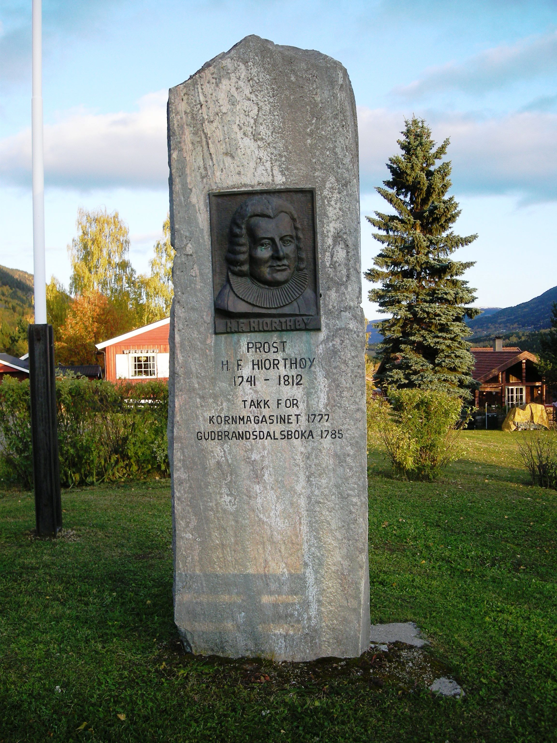 Minnesmerke over Hugo Friderich Hiorthøy på kirkegården ved Sødorp kapell på Vinstra